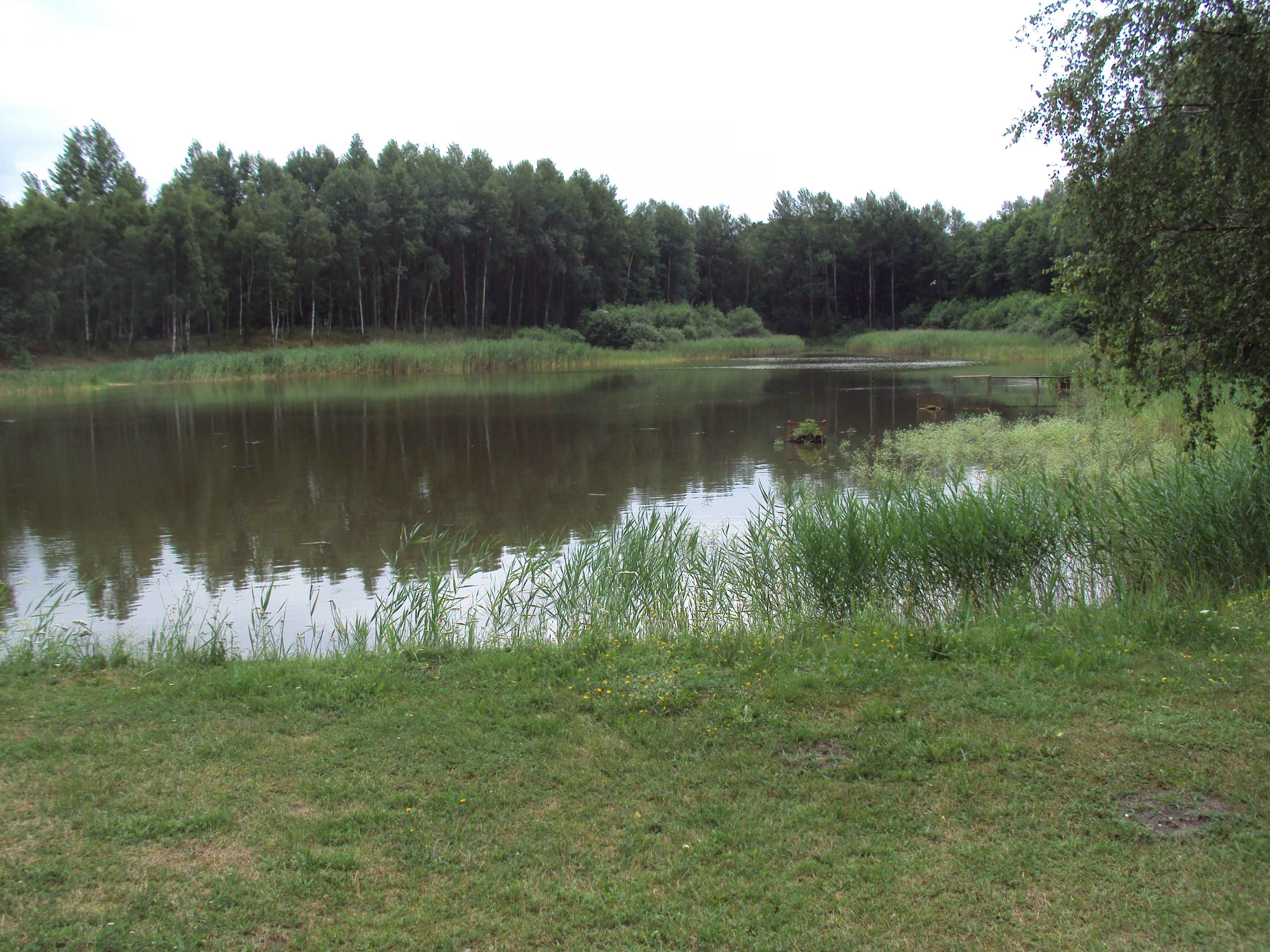 Rybník v Žízníkově, východně od České Lípy